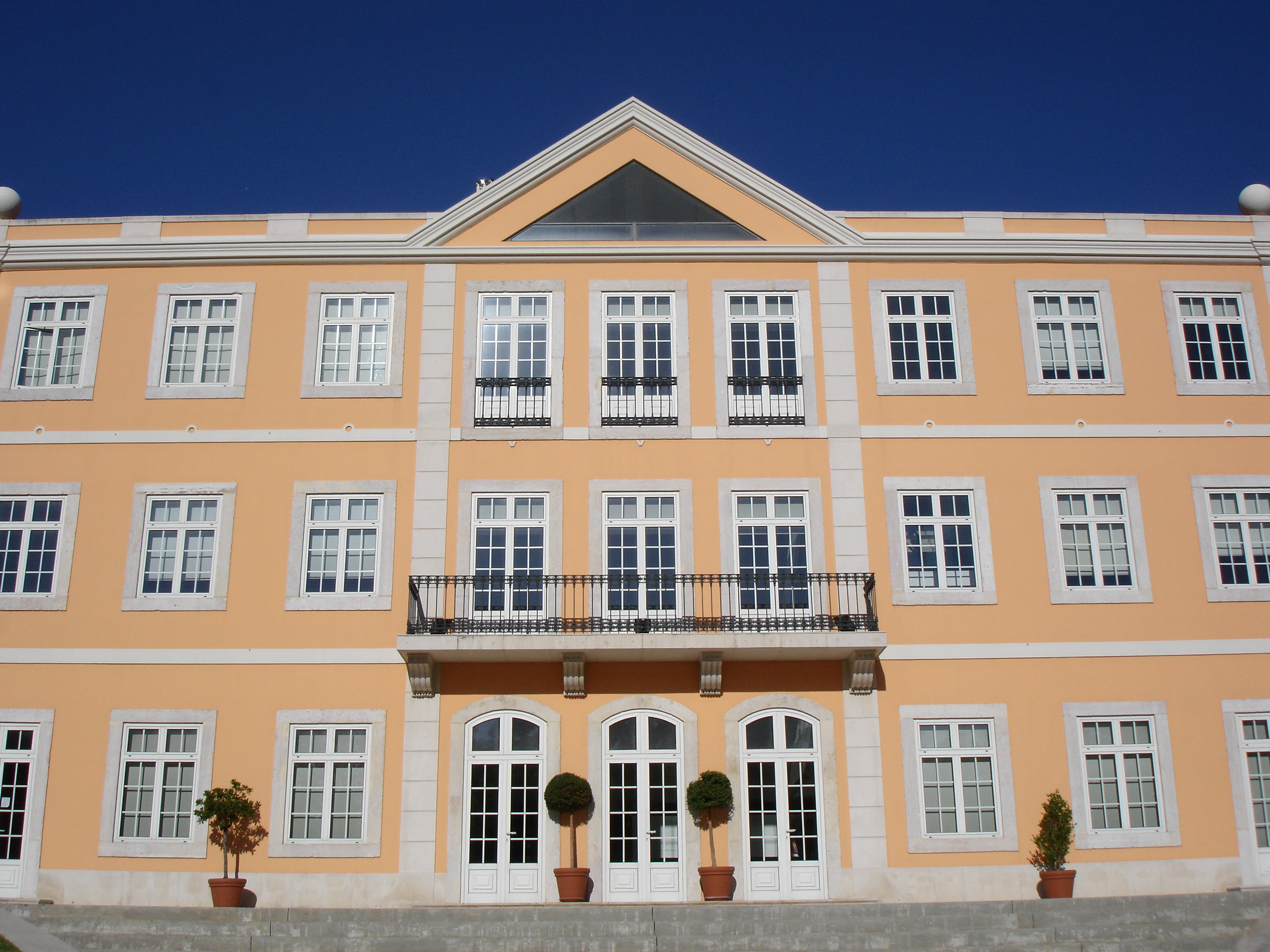 Fachada da Fundação Cidade de Lisboa